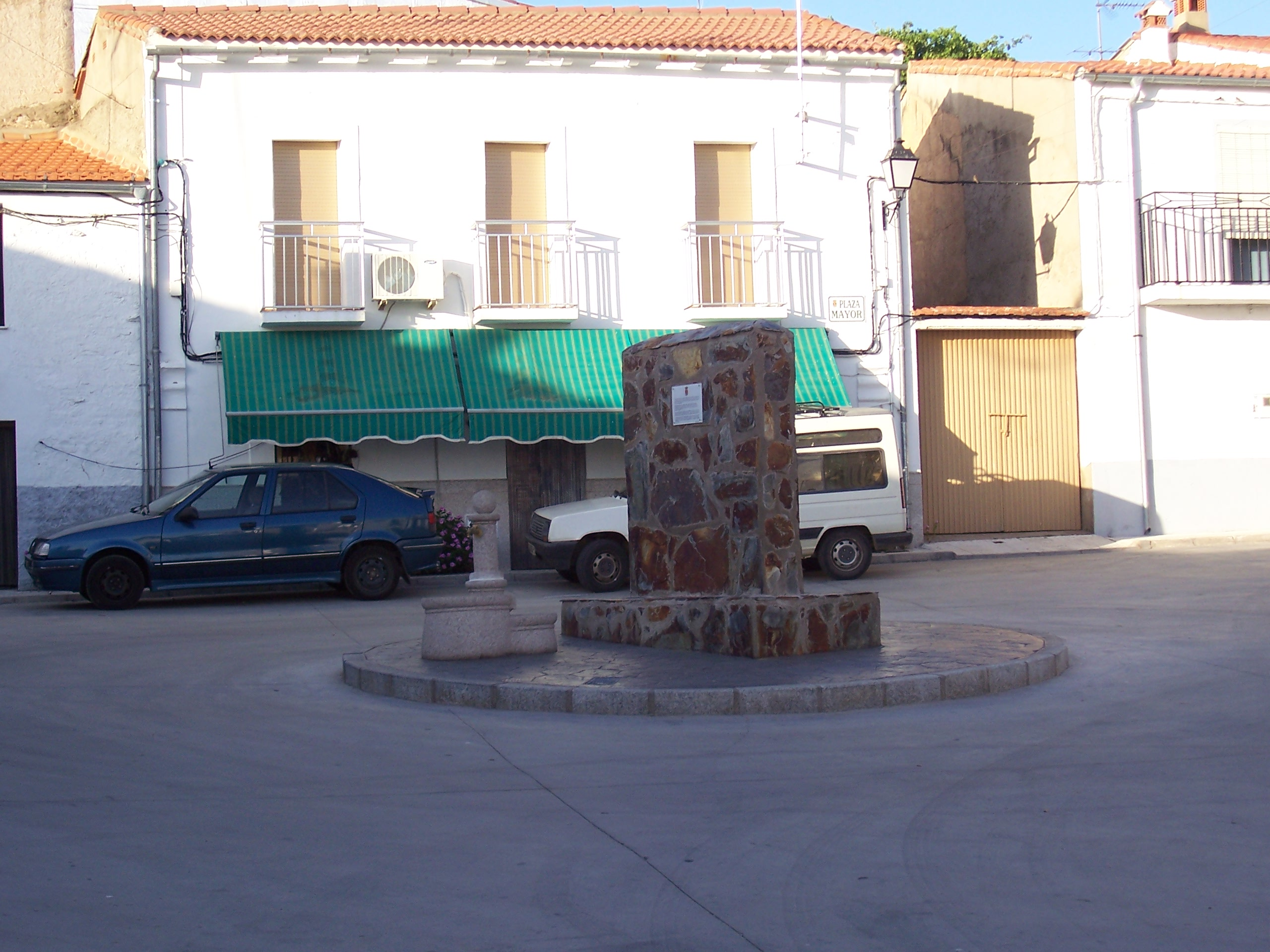 Una fuente en la plaza Mayor de Pescueza, provincia de Cáceres, España.